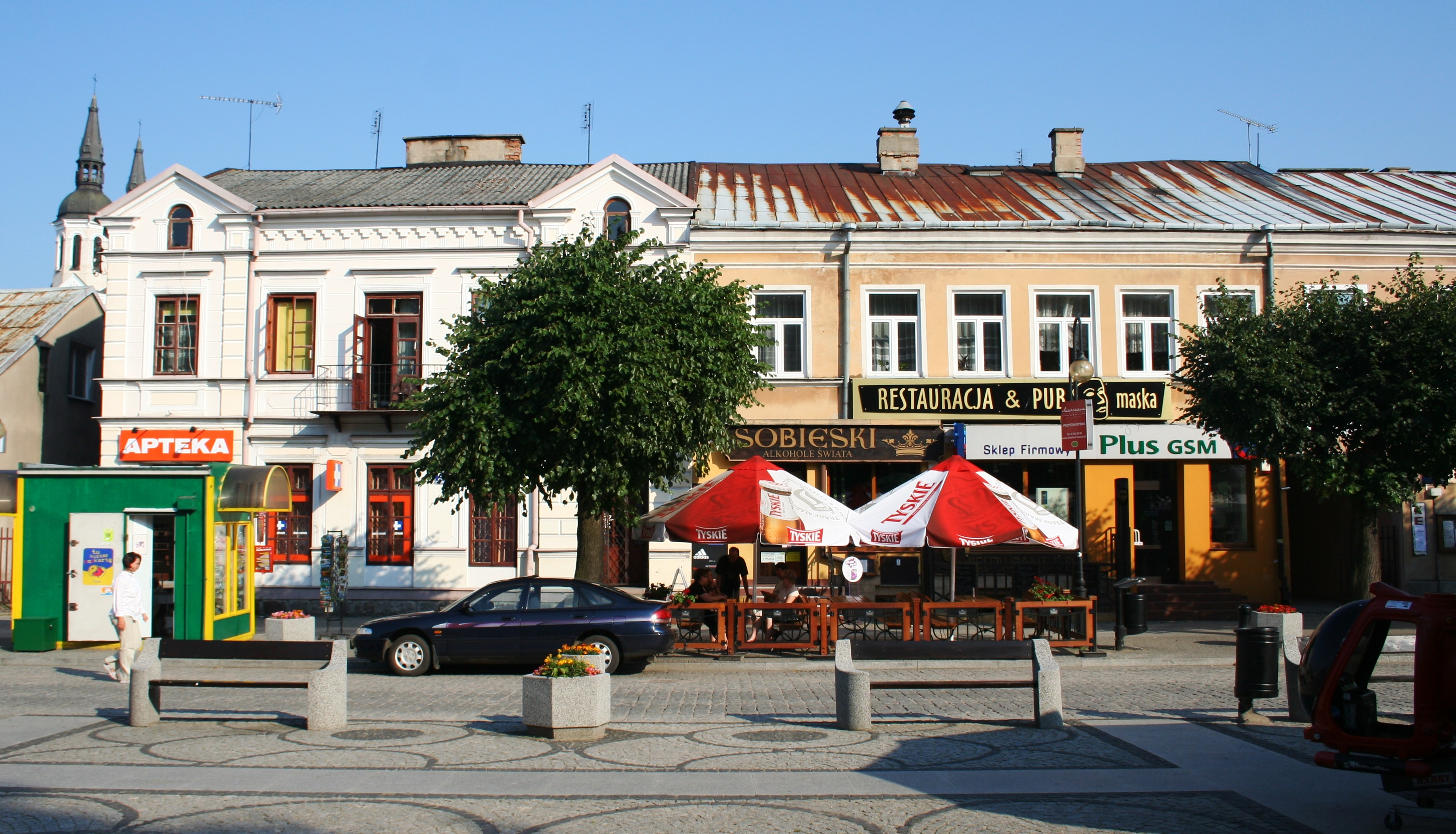 kamienica przy rynku w Augustowie